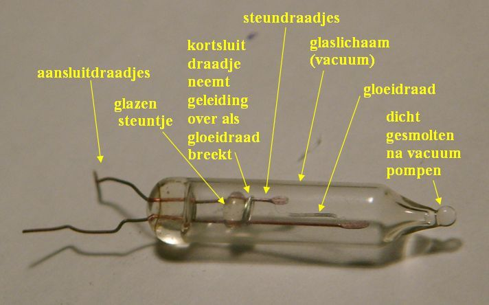 fot kerstboomlampje met intern kortsluitdraadje.